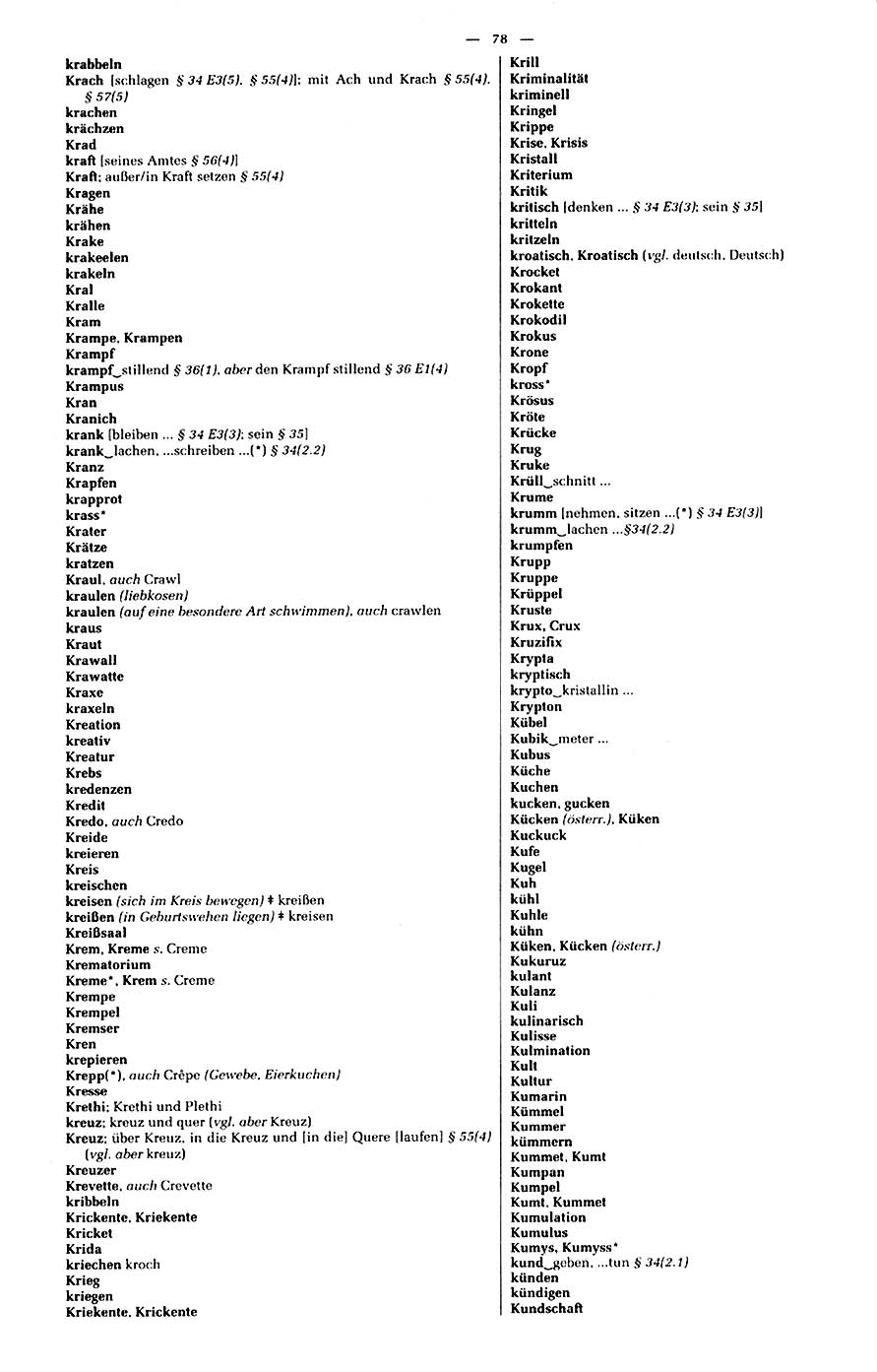 Amtliches orthographisches Wörterverzeichnis von 1996, Seite 78